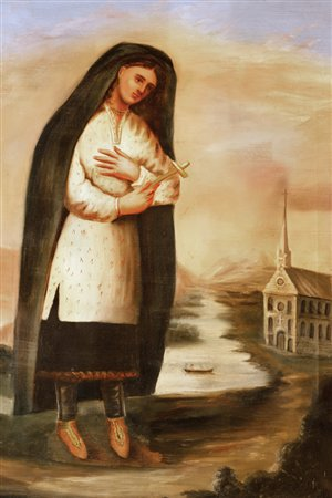 Kateri Tekakwitha - Peinture à l'huile par le père Claude Chauchetière S.J. (1690) Photo : Diocèse de Saint-Jean-Longueuil